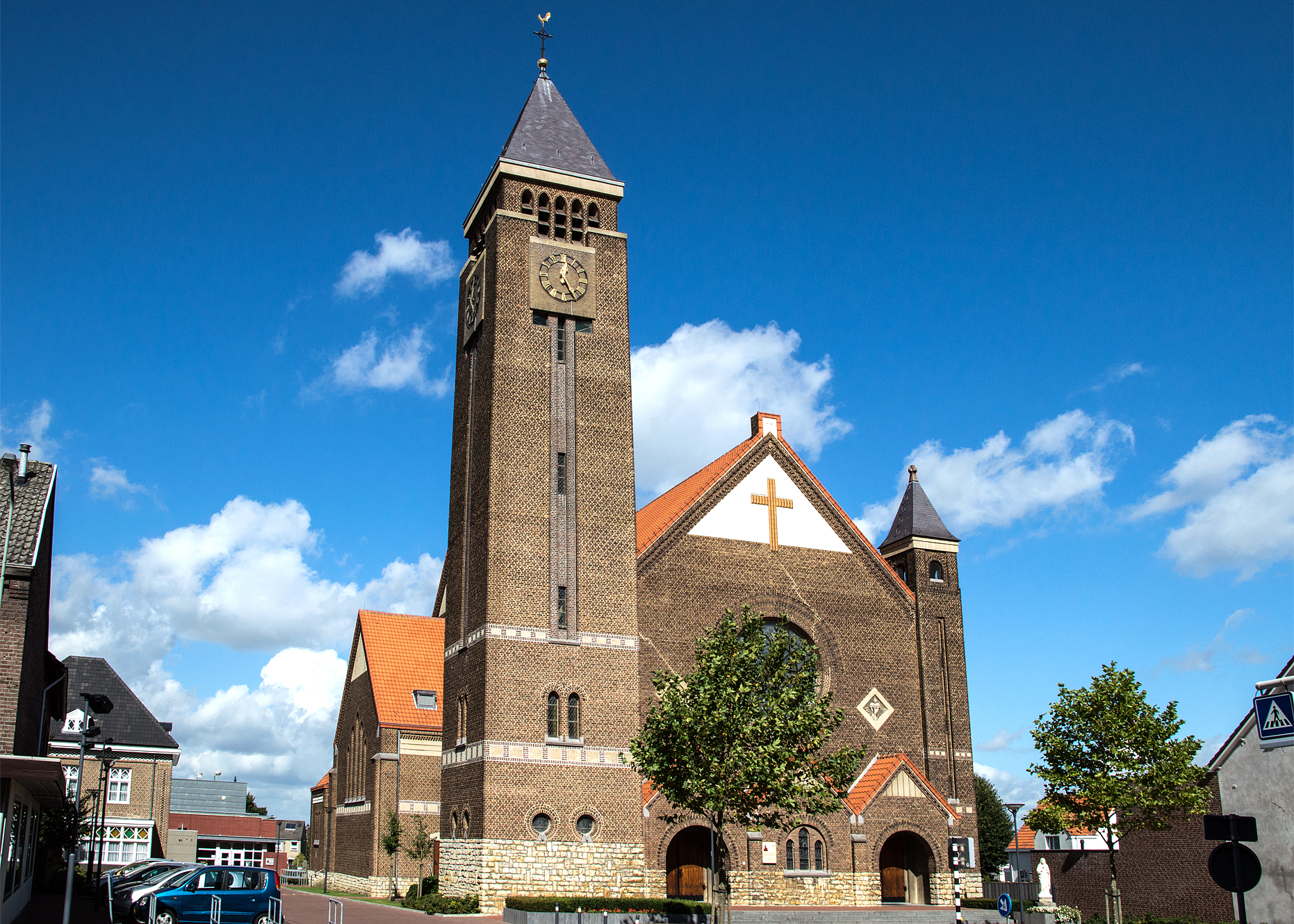 De kerk werd in 1920 in gebruik genomen. Architect was Jos Wielders uit Sittard